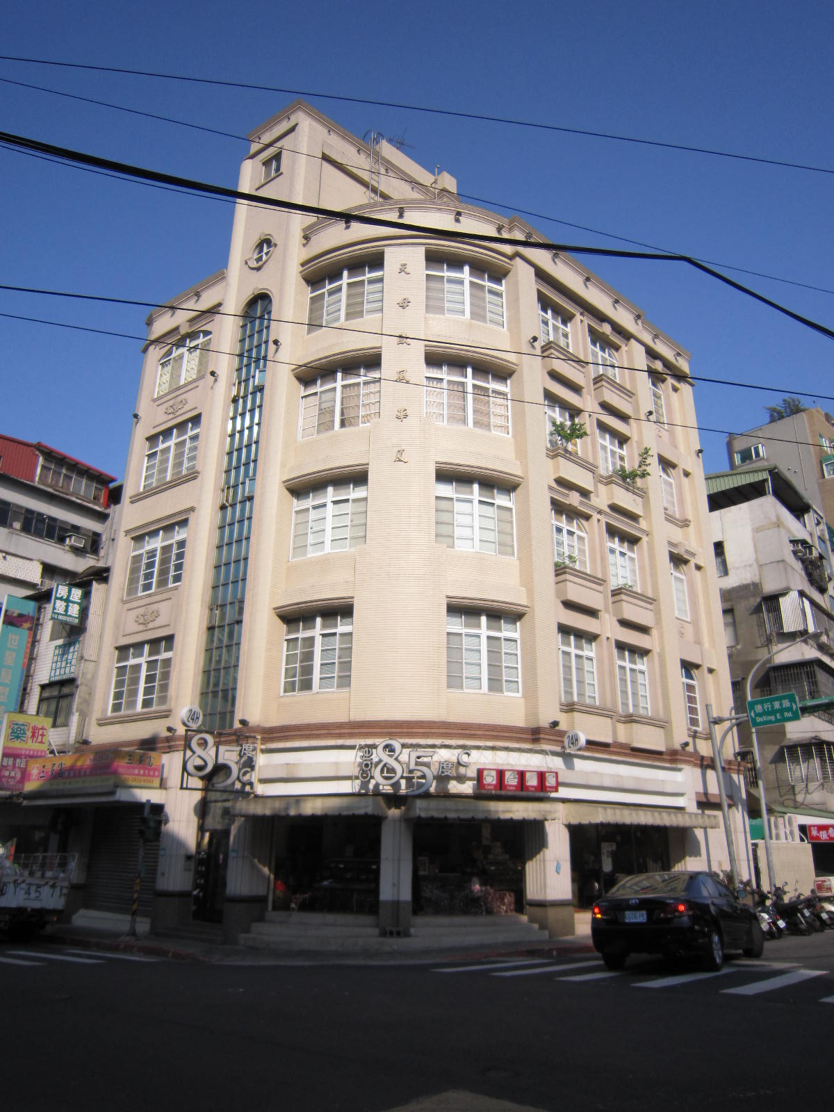 85度C天母德行店，位於臺北市士林區德行東路241號1樓（天母歐風華廈）。